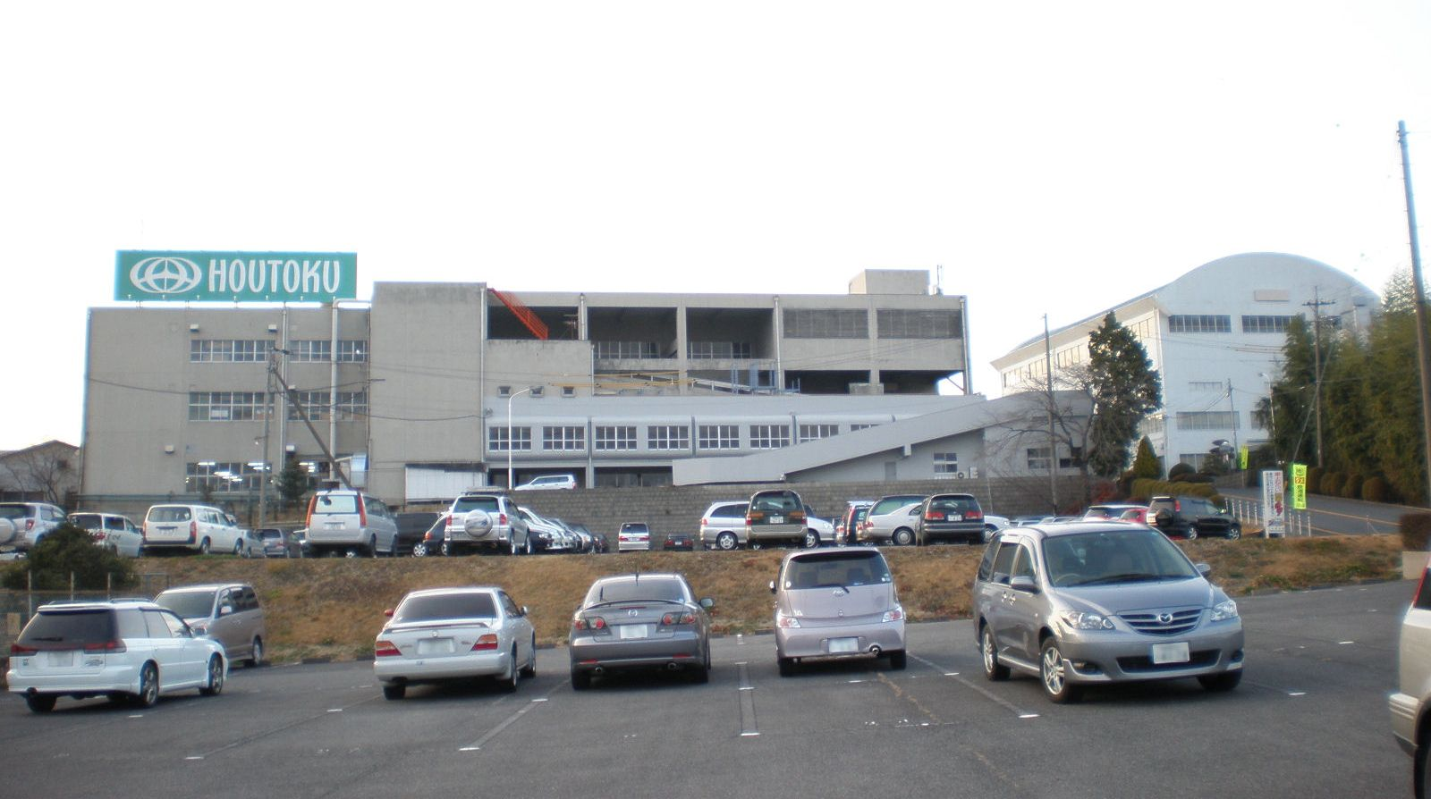 家具製造メーカー・ホウトク本社（撮影場所：愛知県小牧市、※写真の一部を画像編集ソフトで修正）